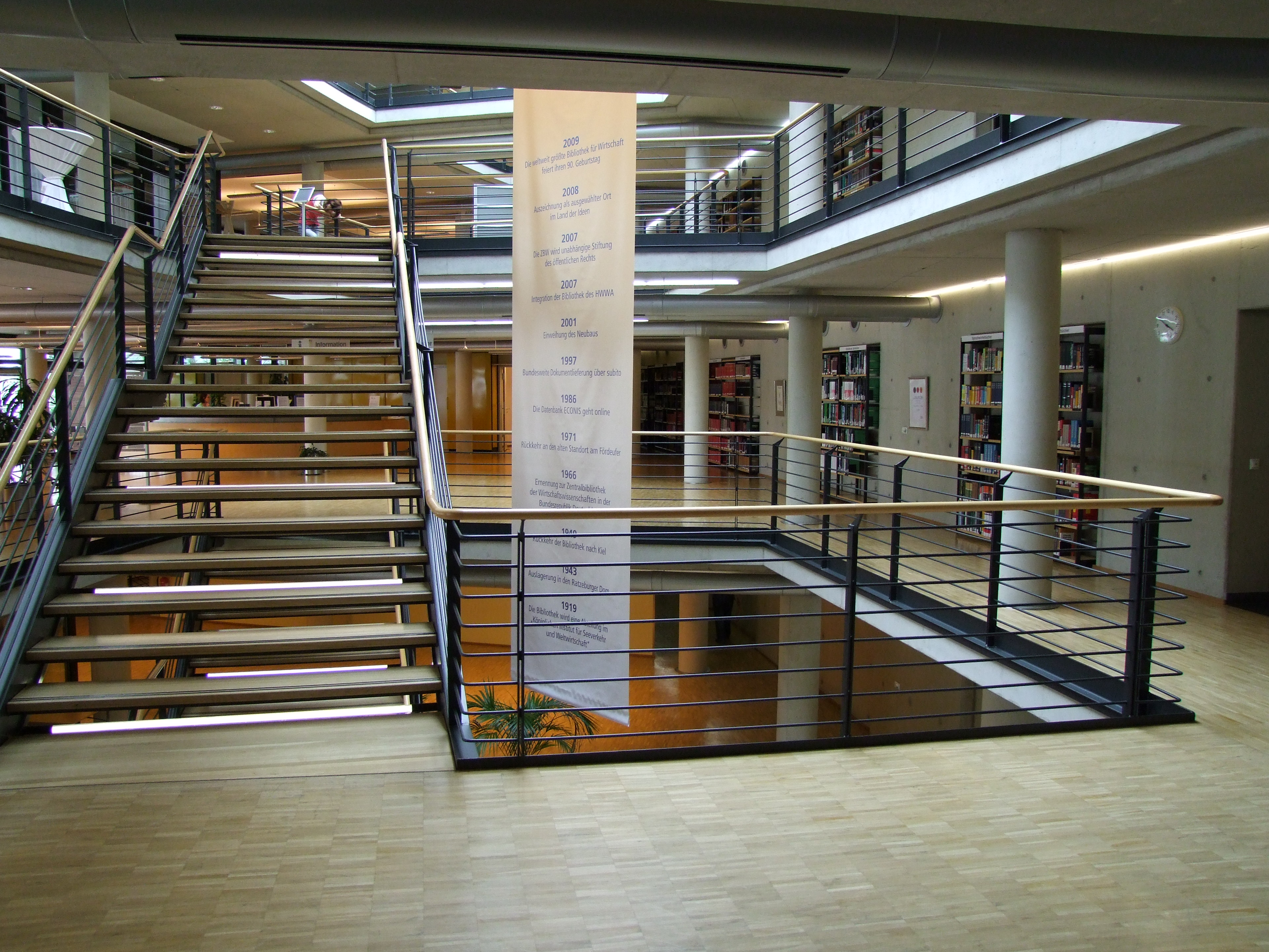 Innenraum der ZBW in Kiel